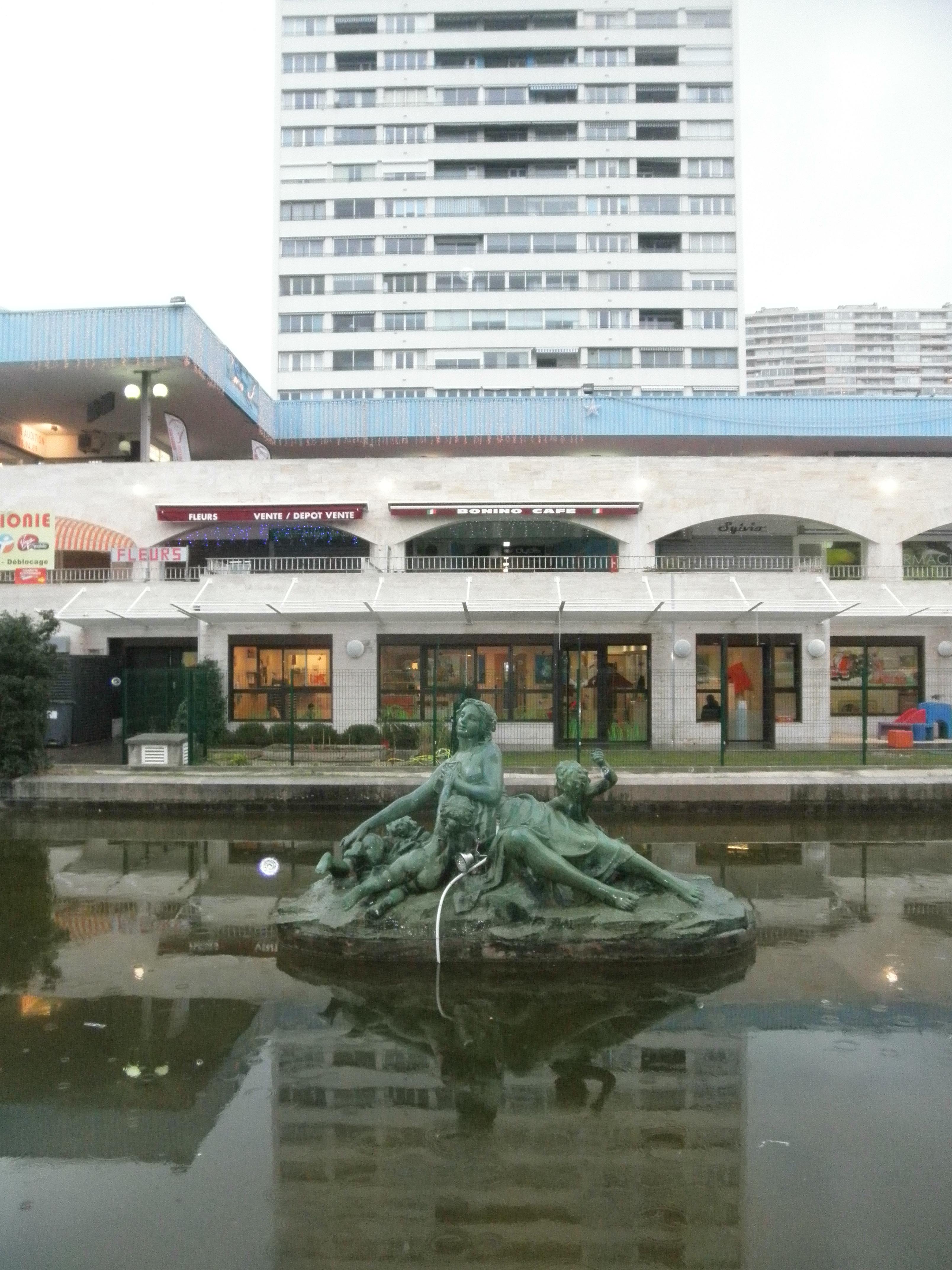 La rouvière en 2014